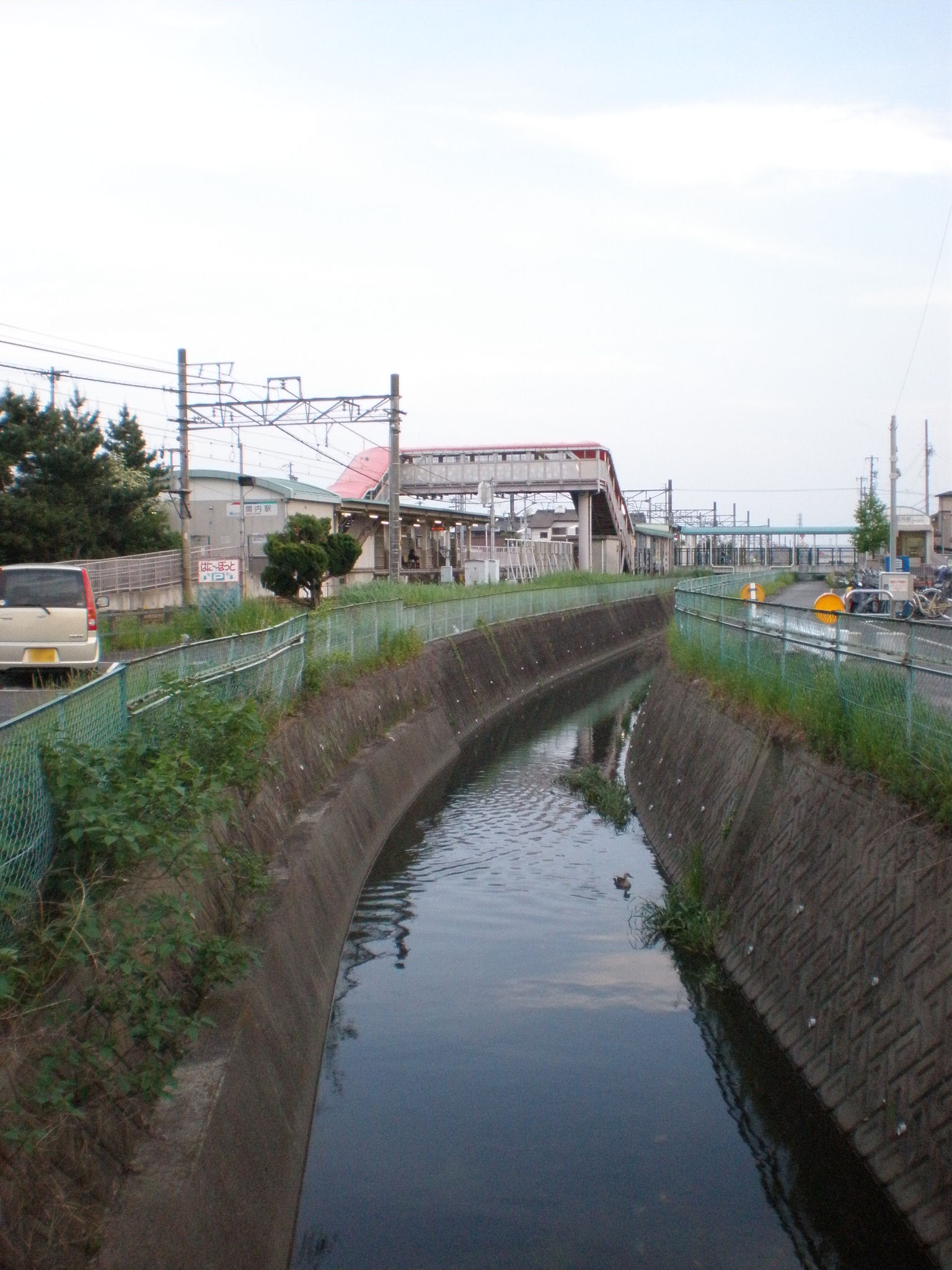 愛知小牧市を流れる池田川（撮影場所：小牧市北外山）。なおこの川は市境を流れており、写真左側が春日井市となる。また正面奥に見える建物は、名鉄小牧線間内駅。